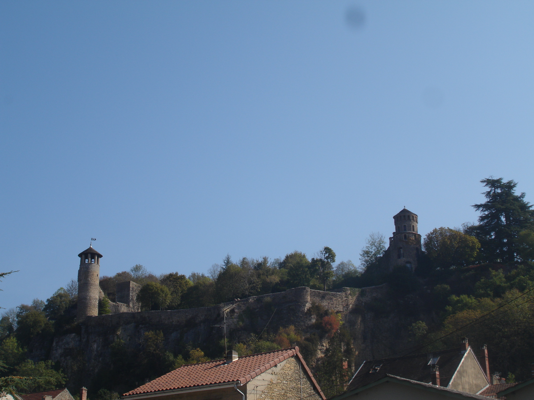 Remparts de la cité médiévale de Crémieu dans le département de l'Isère (France)